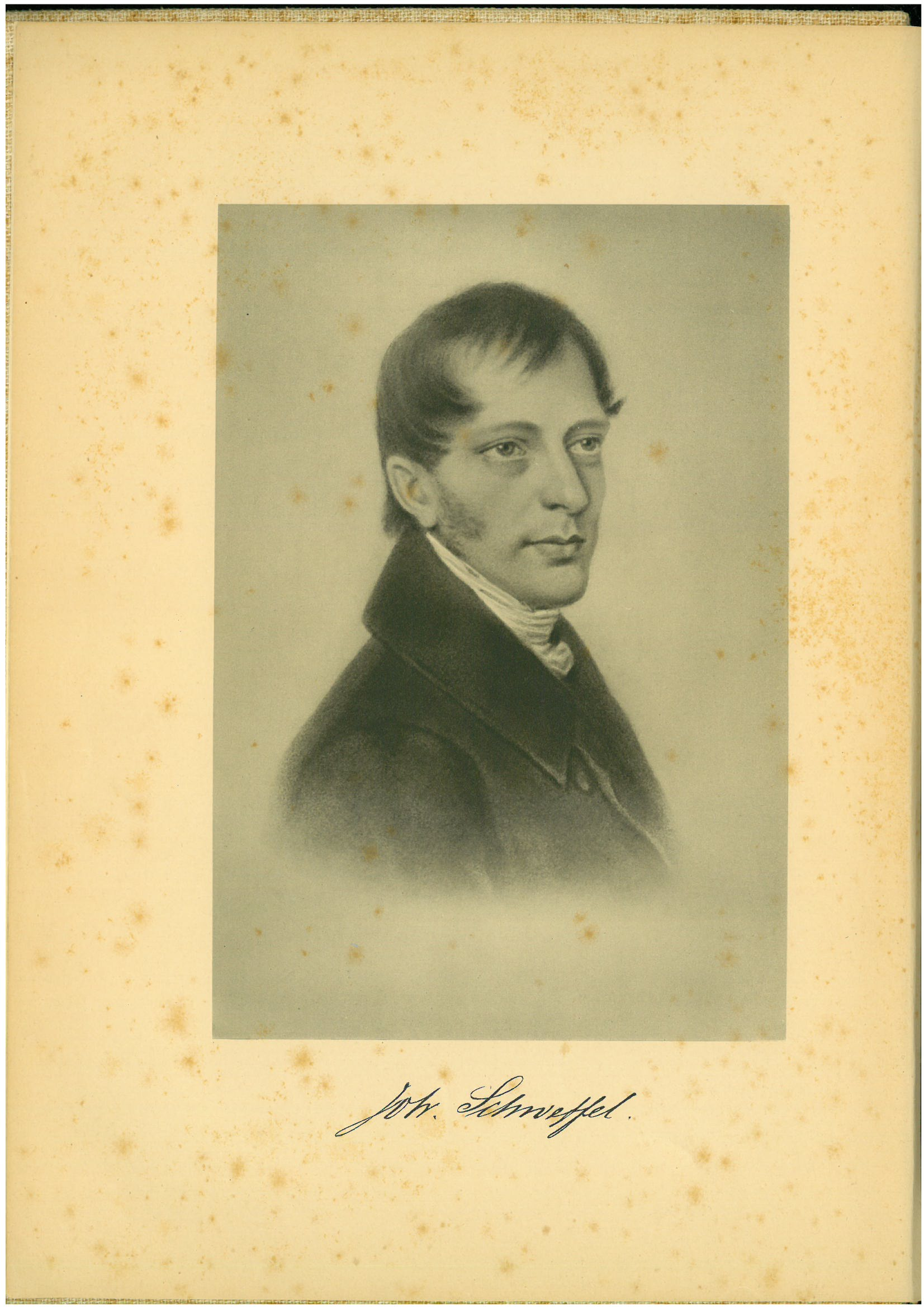 Foto des Kieler Kaufmanns Johann Schweffel III. (* 28. Juli 1796 in Kiel; † 14. April 1865 ebenda)